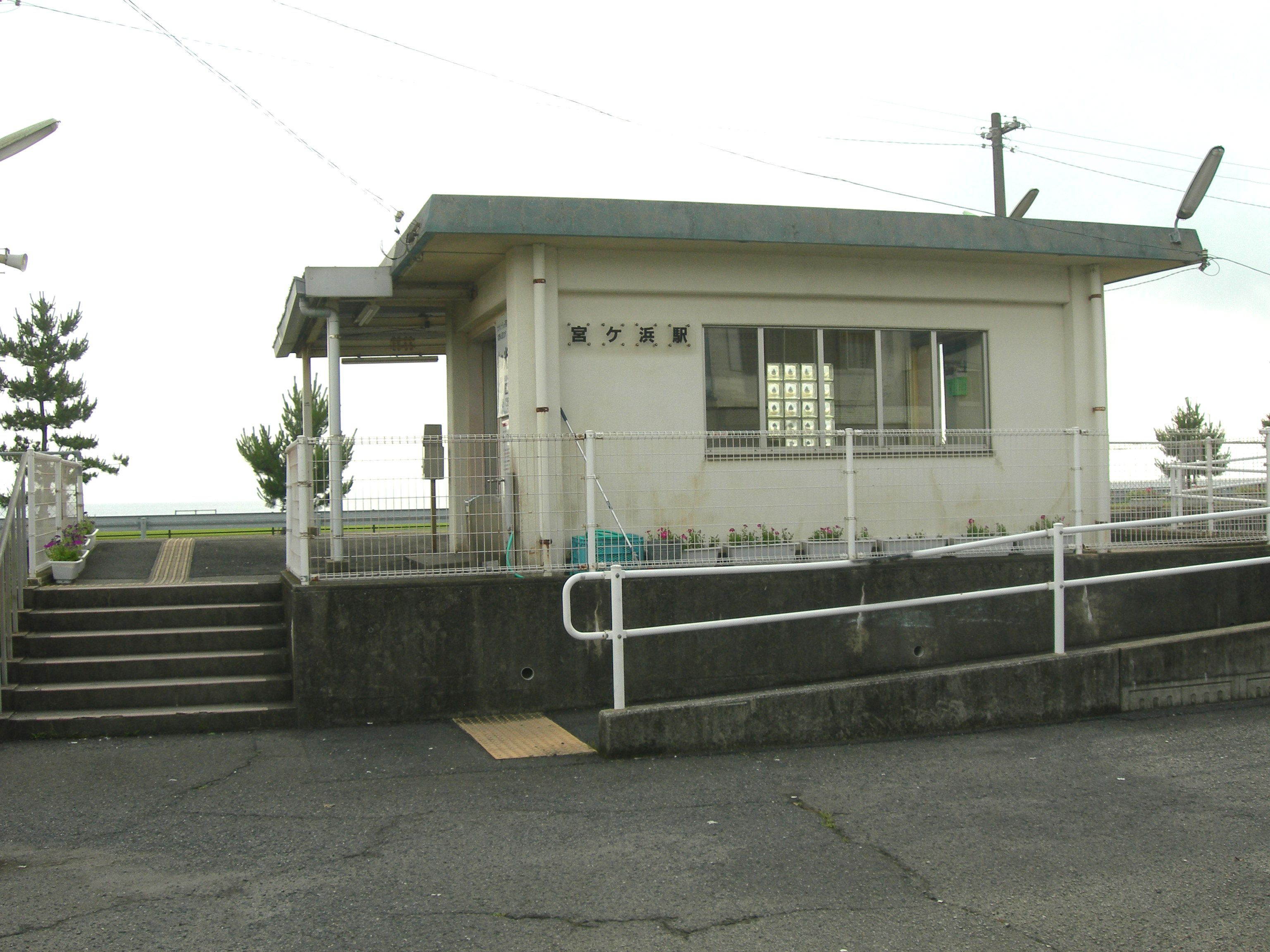 宮ヶ浜駅（みやがはまえき）